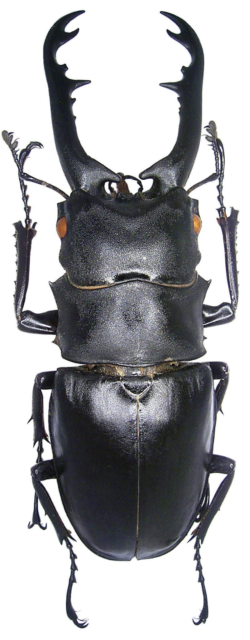 Familie: Lucanidae Grösse: 58-98,3 mm Verbreitung: Indonesien (Sumatra, Java, Bali) Fundort: Indonesien, Sumatra leg. 2006; det. U.Schmidt Foto: U.Schmidt, 2007